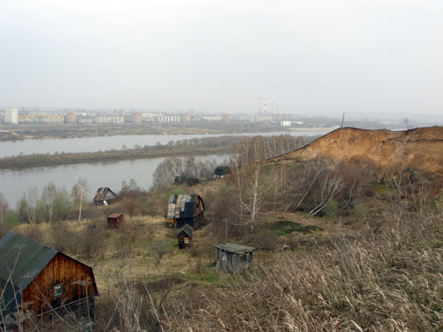 Оползень у посёлка Новинки Богородского района Нижегородской области.